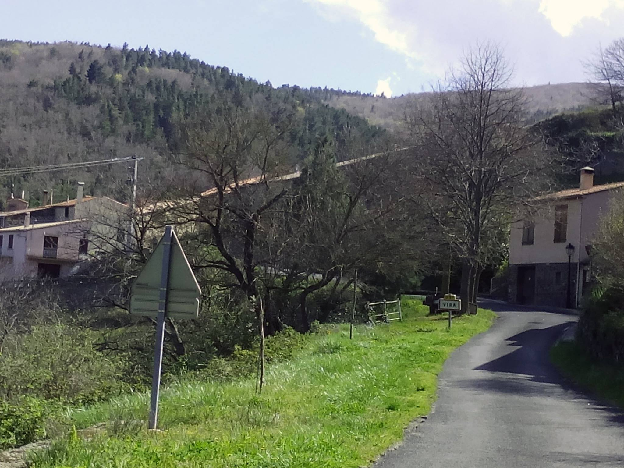 Entrée de Vira